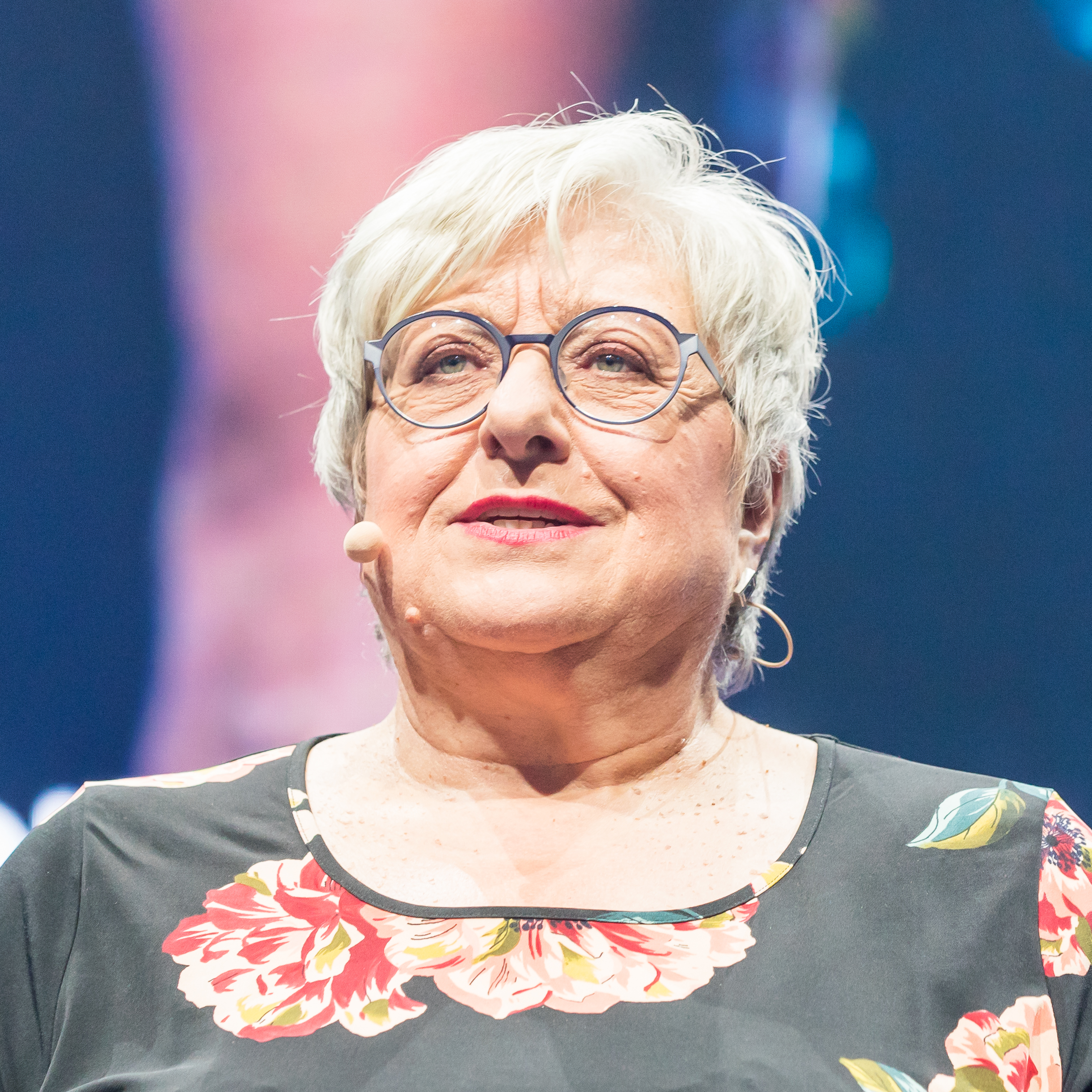 GedankenTanken Köln 2018 - 06 - Rednerin Sabine Asgodom